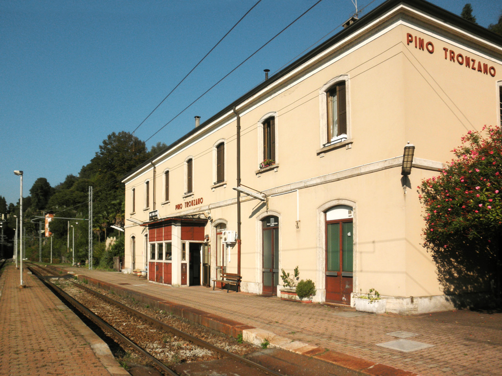 Stazione ferroviaria di Pino-Tronzano.